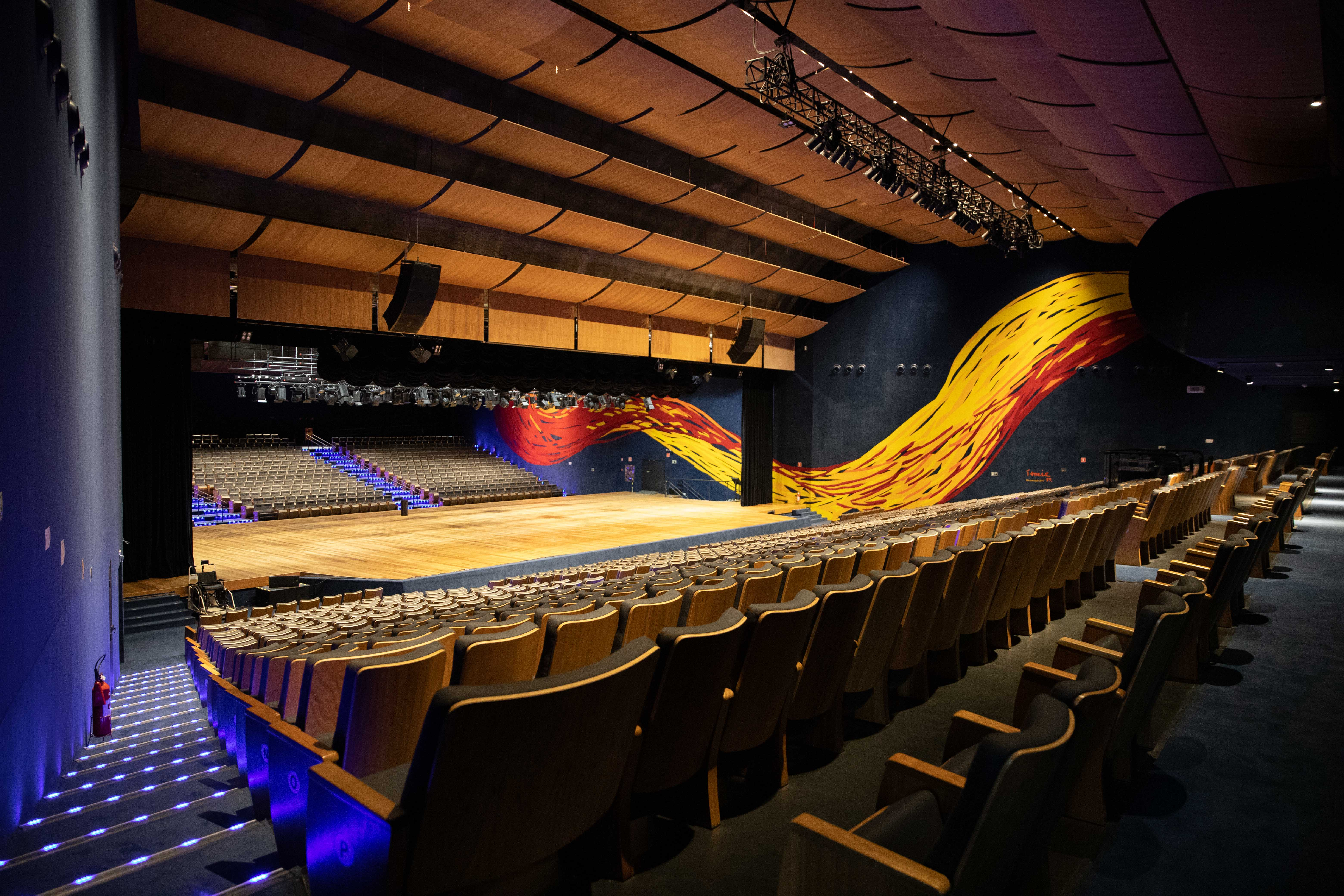 Com 78 mil m² de área construída, o Memorial da América Latina foi concebido para ser um espaço de integração e informação dos países latino- americanos, de suas raízes e culturas, e acolhe, também, a sede do Parlamento Latino-Americano - Parlatino. Projetado pelo arquiteto Oscar Niemeyer, o Memorial abriga um pavilhão de exposições, onde a rica produção artesanal do continente encontra-se permanentemente exposta; uma biblioteca com livros, jornais, revistas, vídeos, filmes e gravações sonoras sobre a história da América Latina; um salão para exposição e um auditório com capacidade para 1.679 pessoas, um dos maiores do Estado. Local: São Paulo/SP Data: 16/04/2019 Foto: Governo do Estado de São Paulo